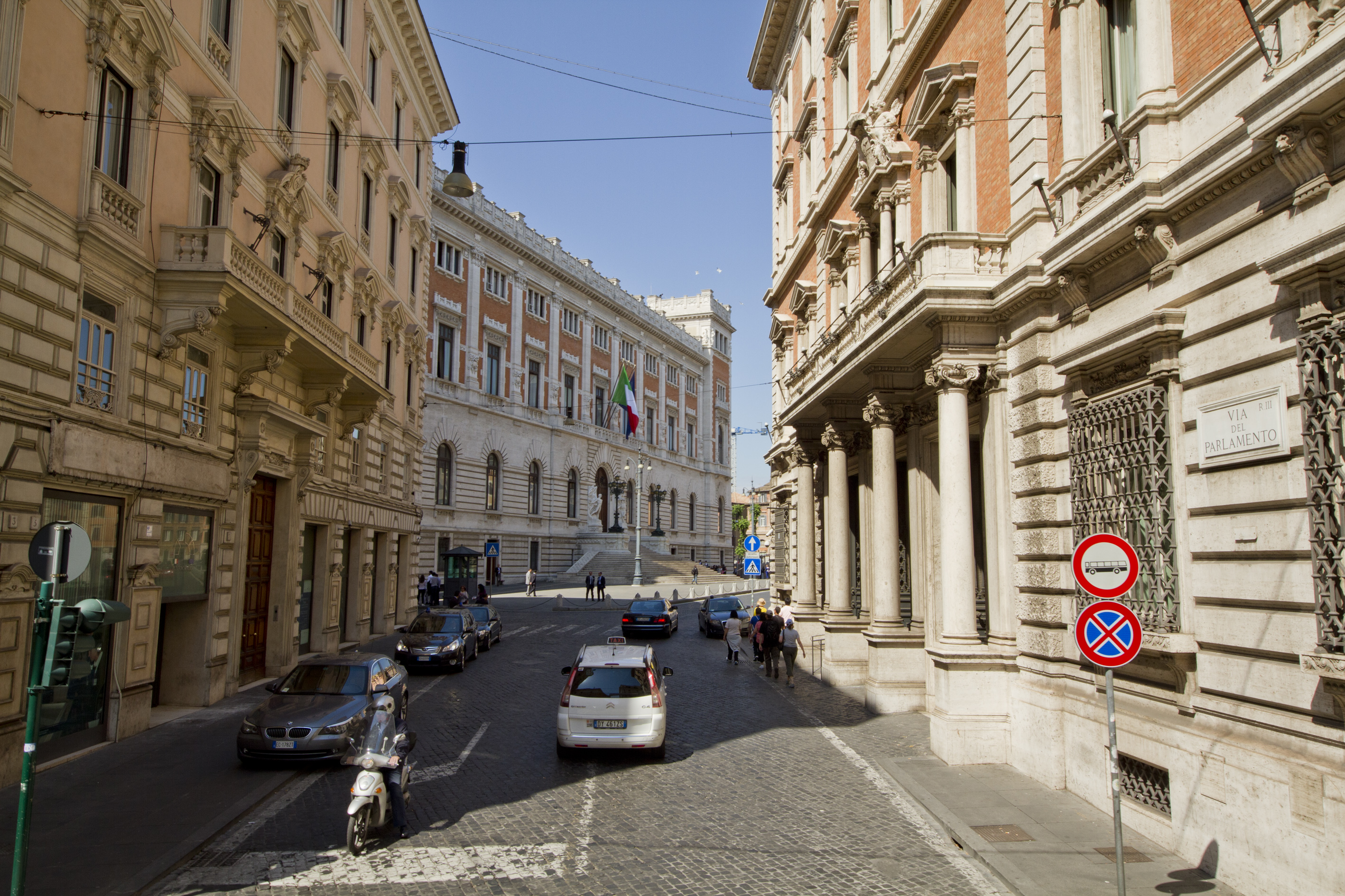 Via del Parlamento